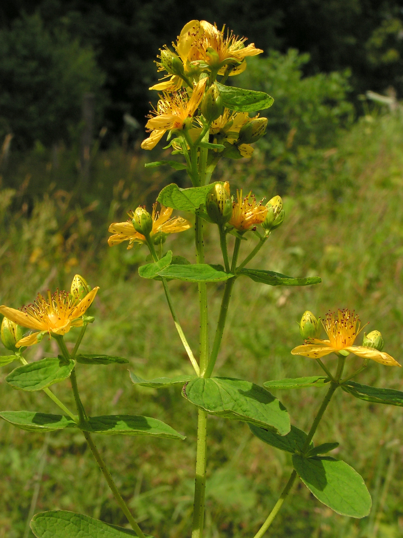 Hypericum perforatum L.